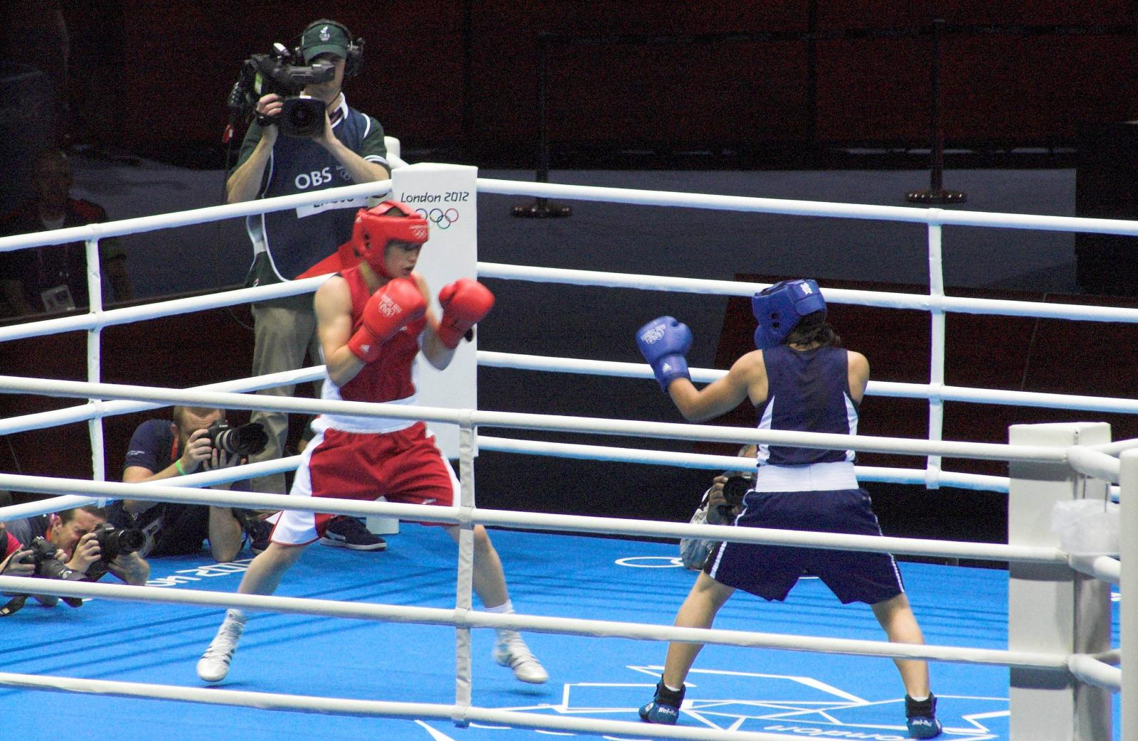 Katie Taylor